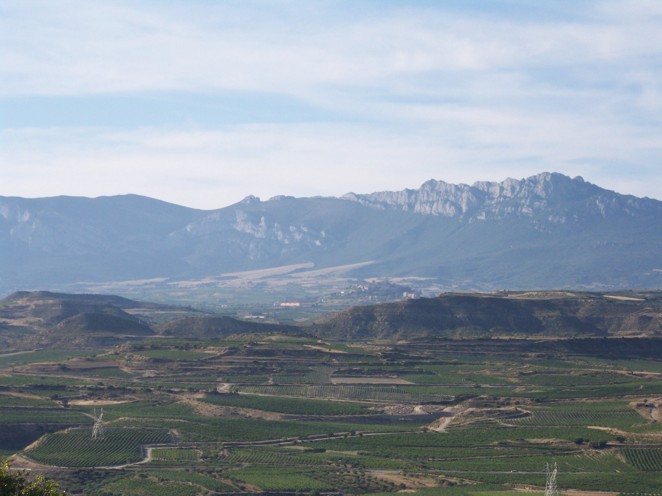 Panorámica del pico San León en la Sierra de Cantabria (Álava, España). Debajo se observa Laguardia y parte de la Rioja Alavesa.